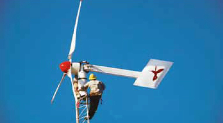 Instalación de un aerogenerador “Colibrí”. Fuente: Potencia Industrial, S.A. Fecha: 1976 (Archivo derivado=2014)